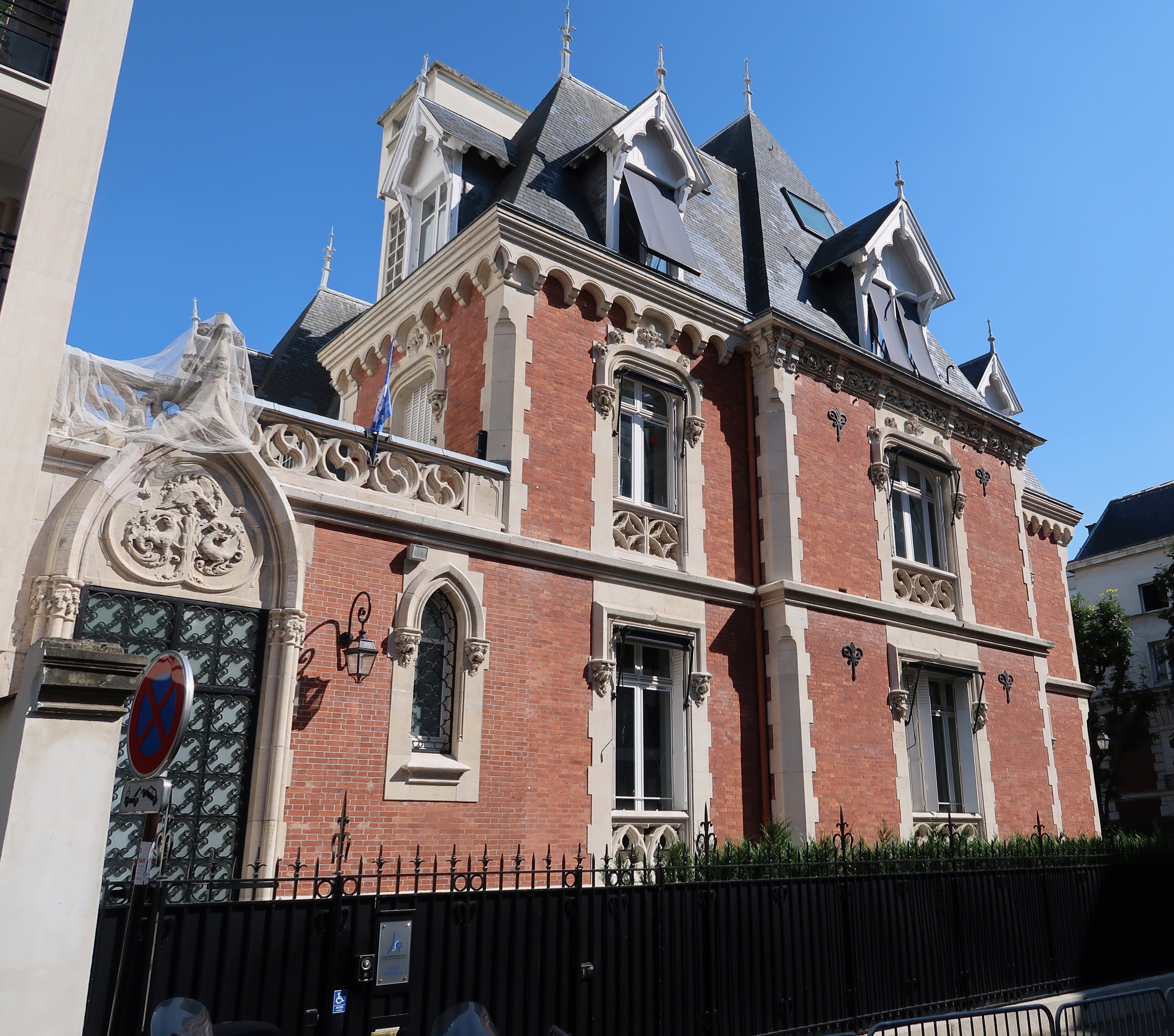 45 rue Cortambert (Paris, 16e).